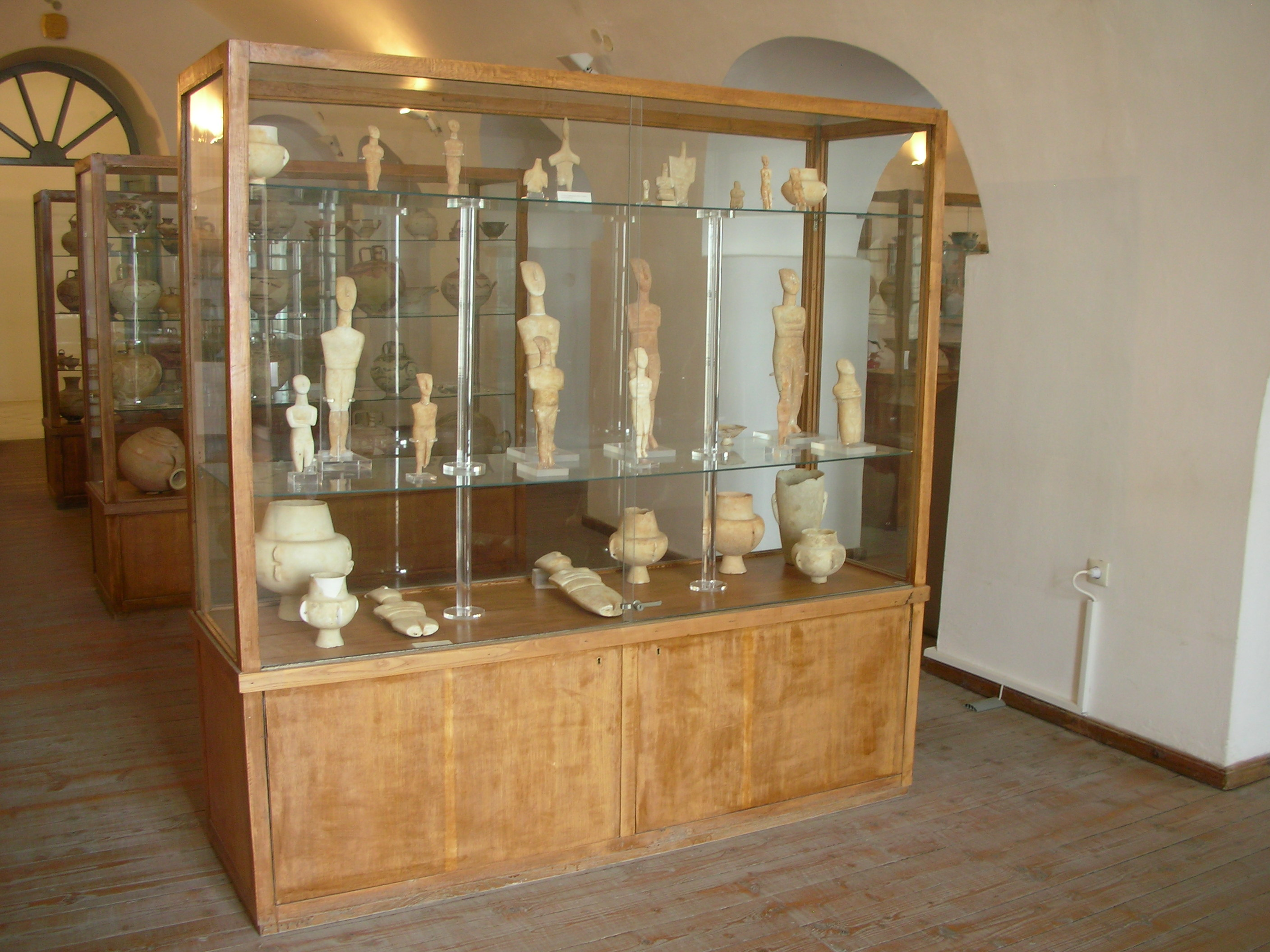 Archäologisches Museum Naxos, Kykladenidole, Raum IV